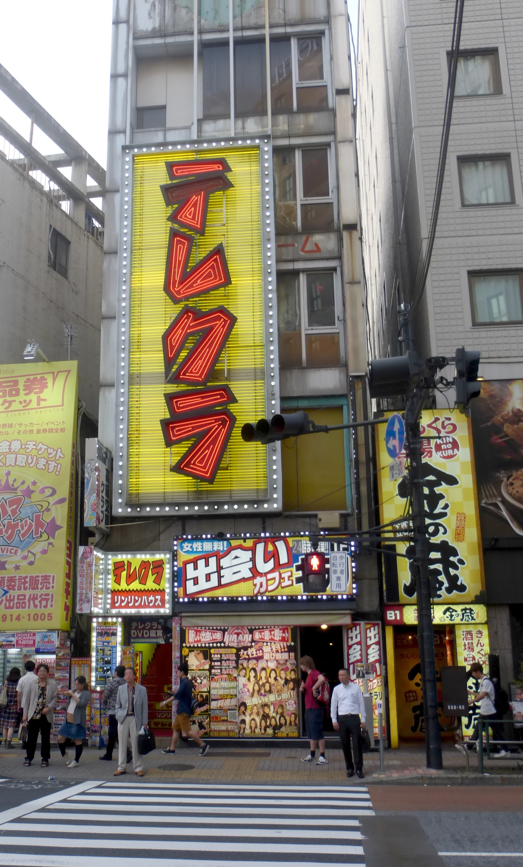 Telekura in Ikebukuro (池袋のテレクラ)